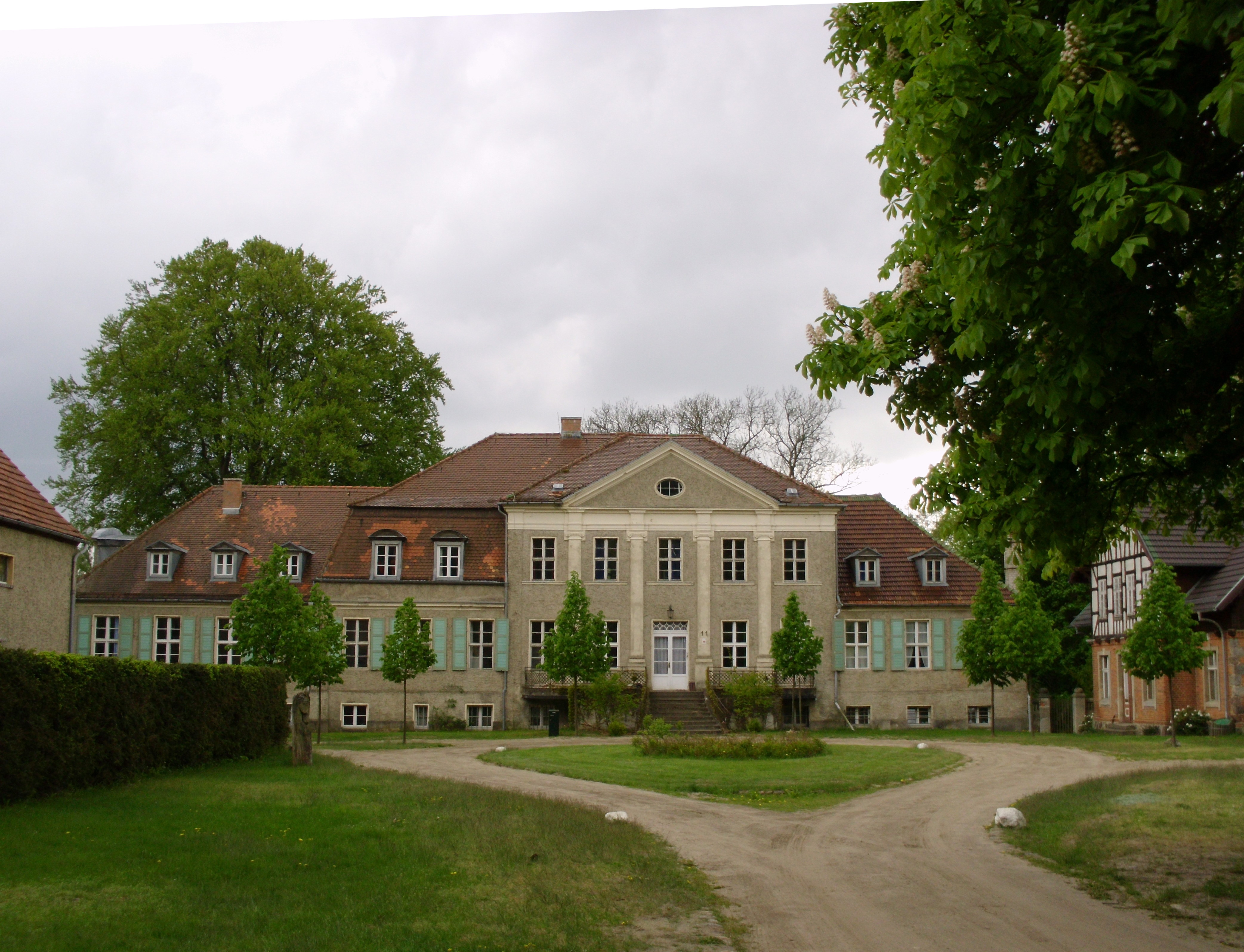 Gutshaus Binenwalde, Ortsteil von Neuruppin, Brandenburg, Deutschland